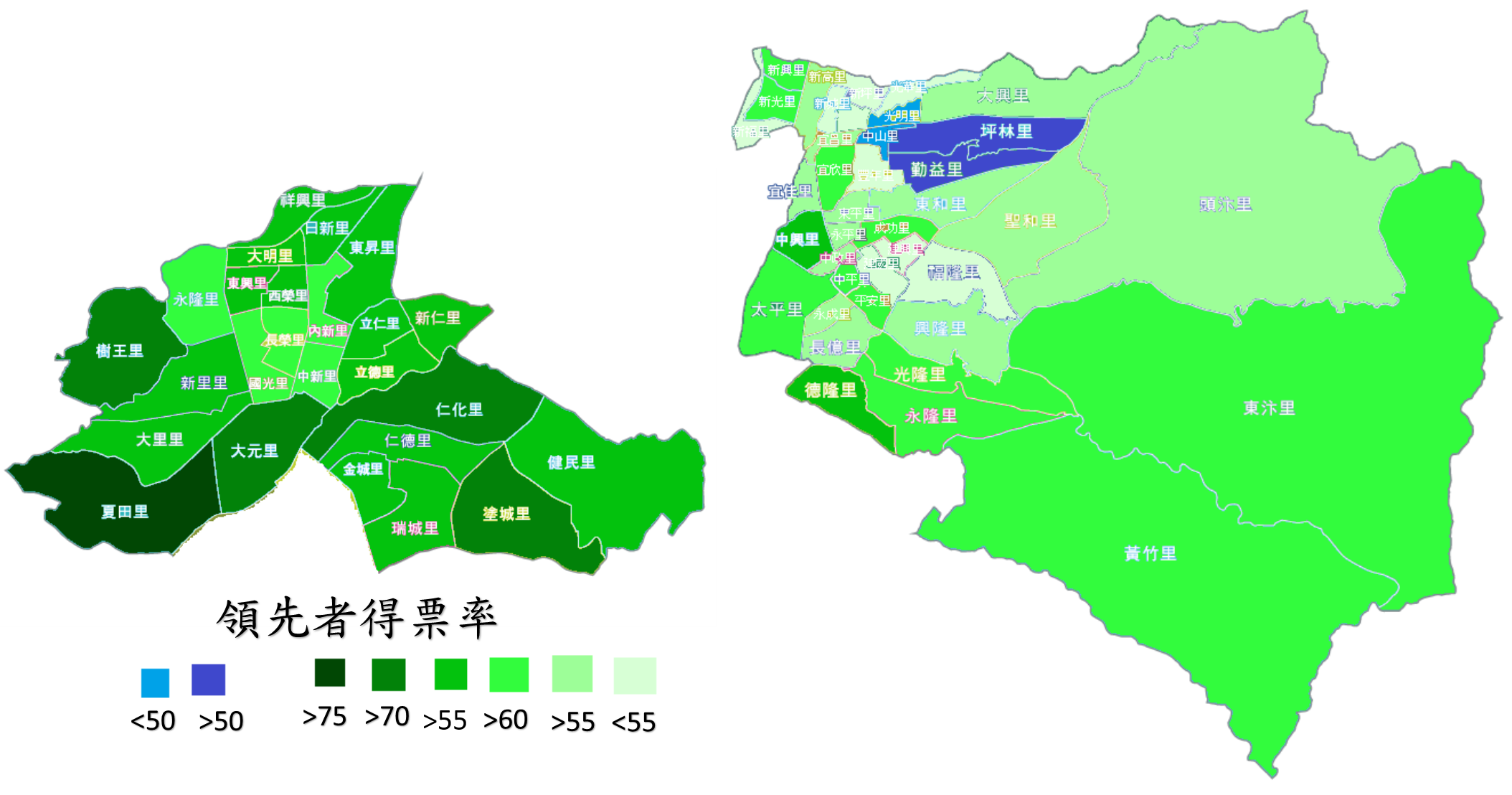 第九屆立委太平大里各里得票率